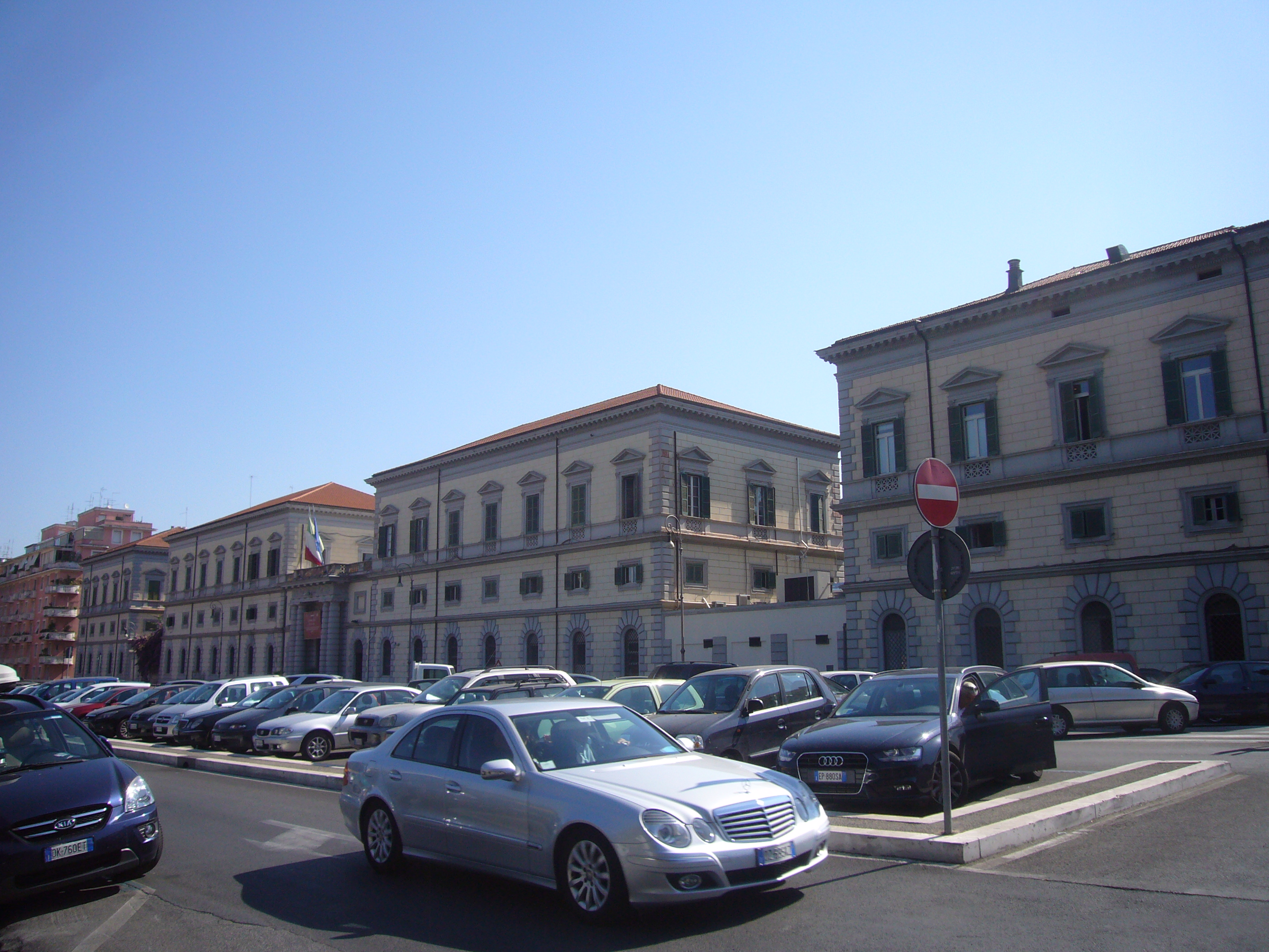 Roma, Policlinico militare del Celio